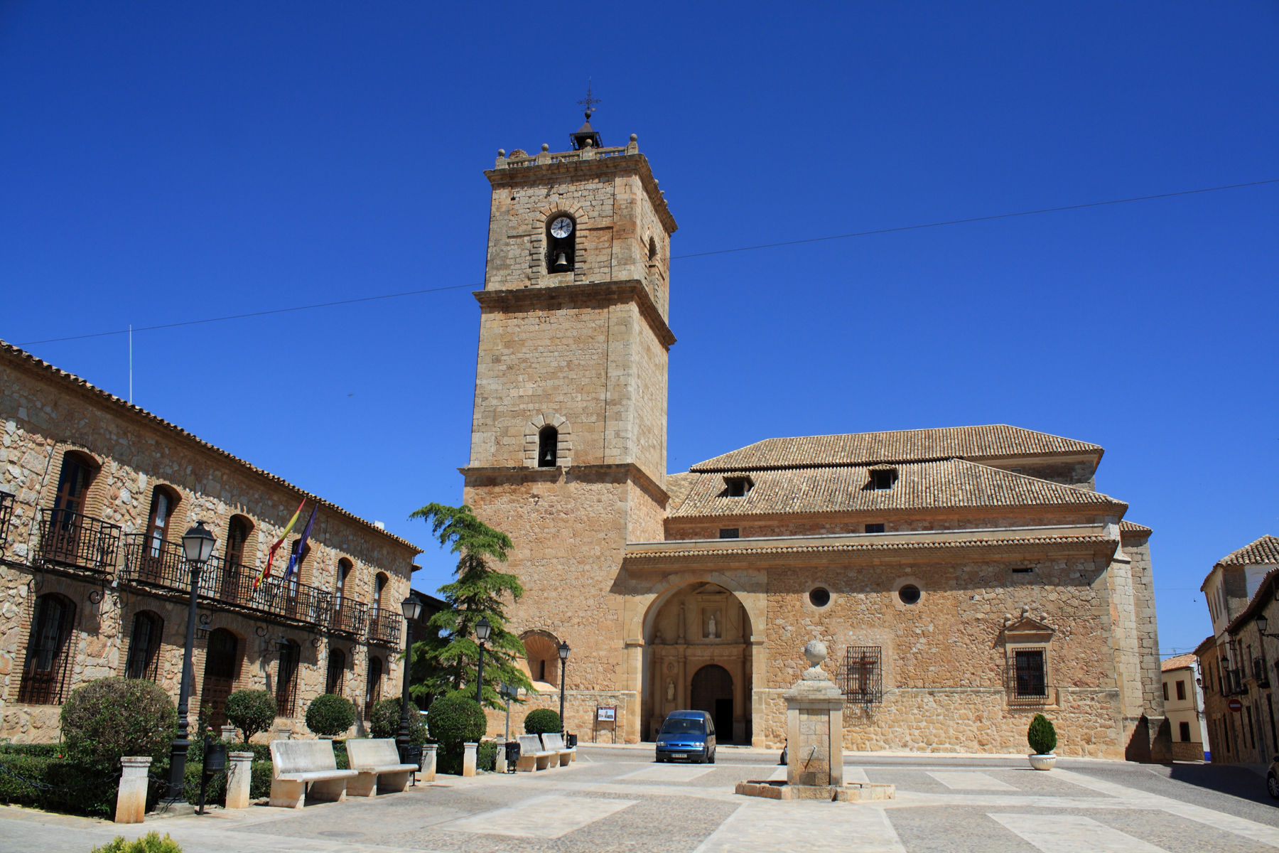 El Toboso Provincia de Toledo Castilla la Mancha España